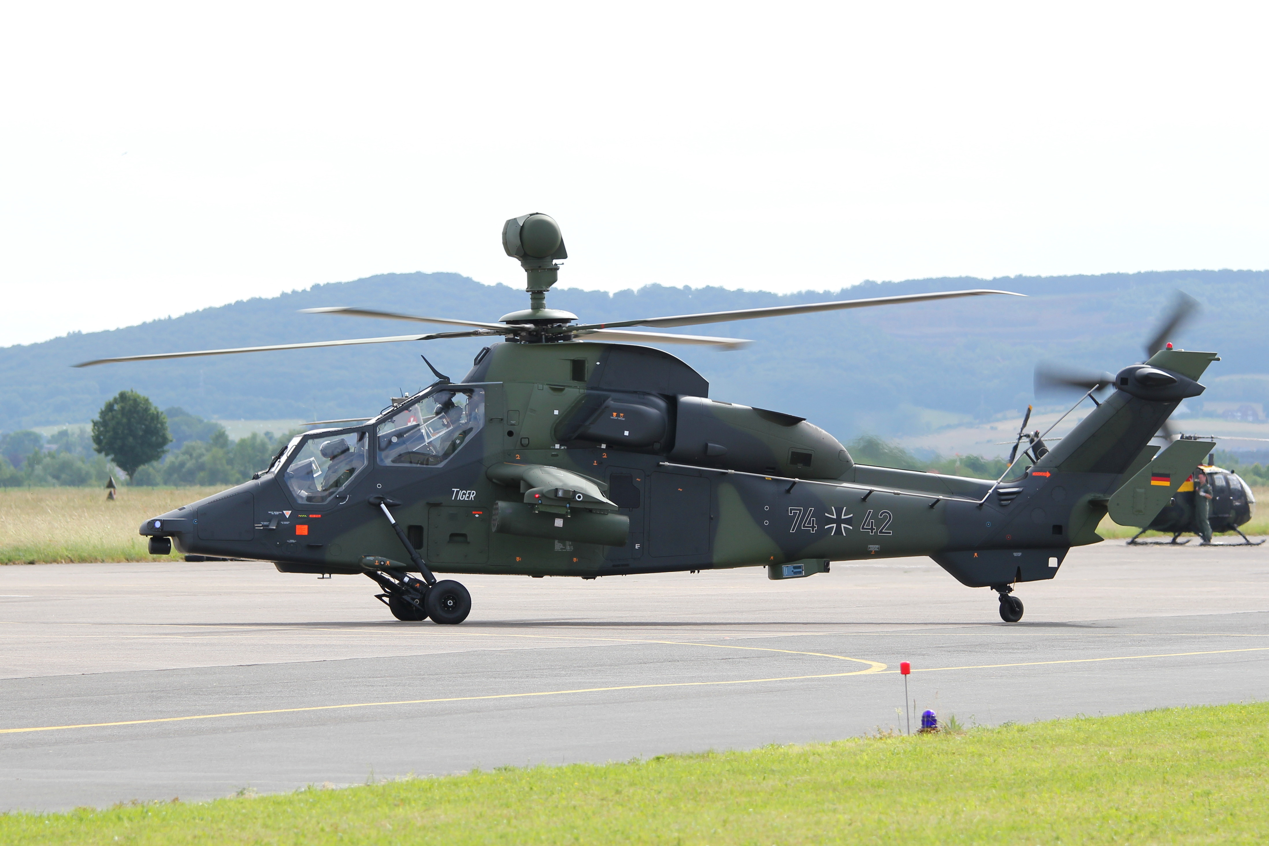 Aufgenommen am Tag der Bundeswehr 2016 beim internationalen Hubschrauberausbildungszentrum auf dem Heeresflugplatz Bückeburg.